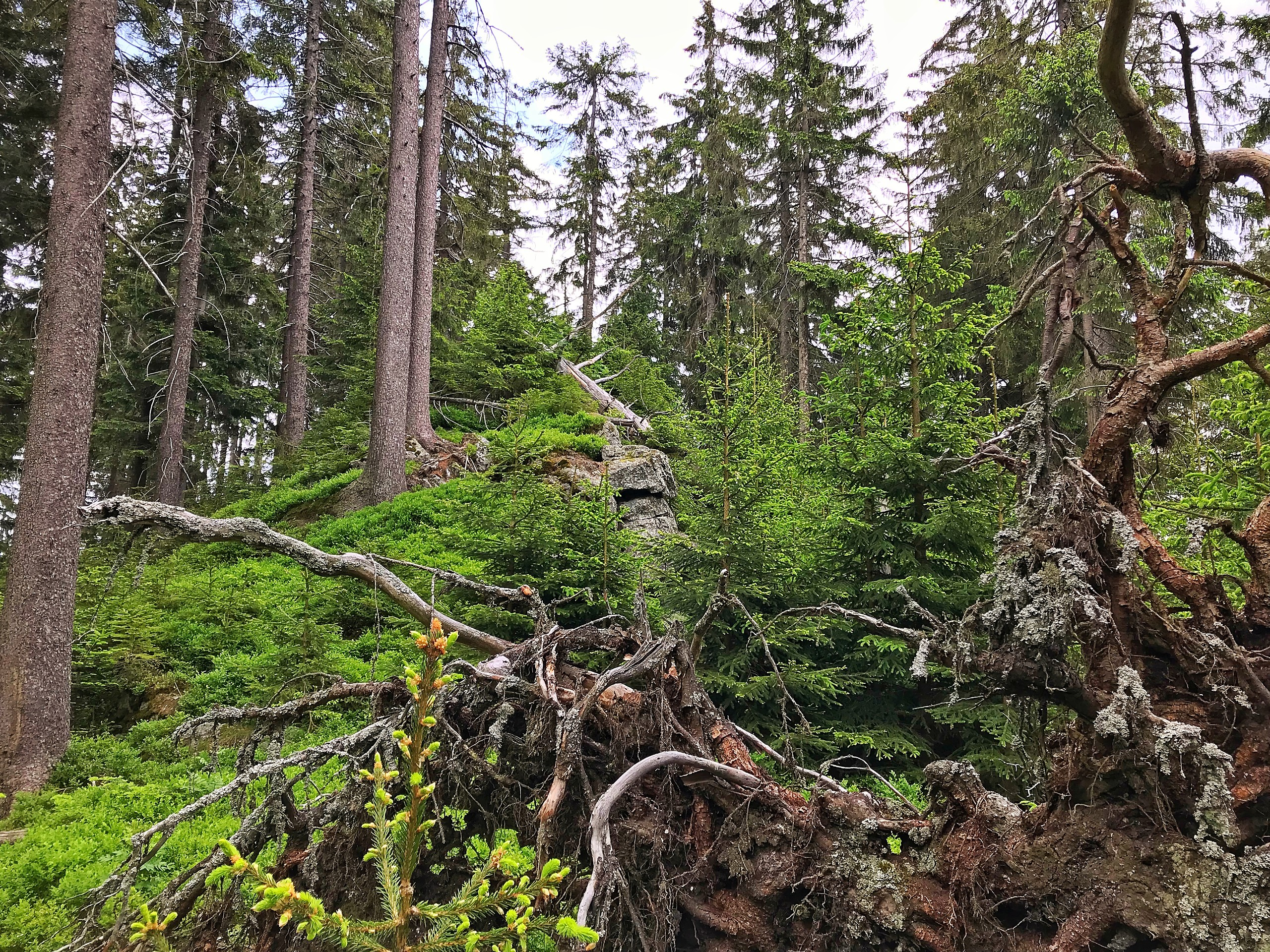 Sklanatý hřbet (1072 m) na Šumavě